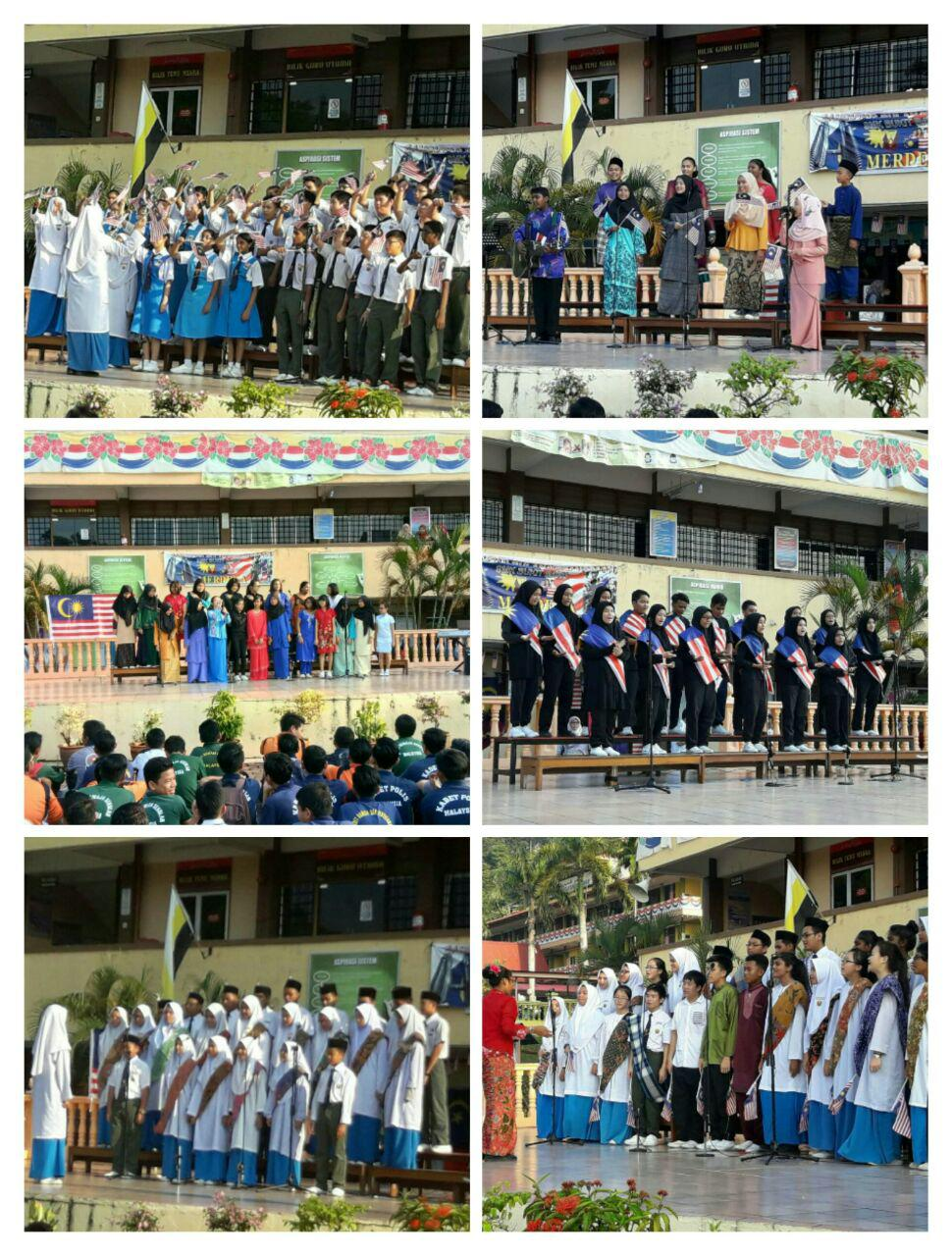 Pertandingan Lagu Patriotik